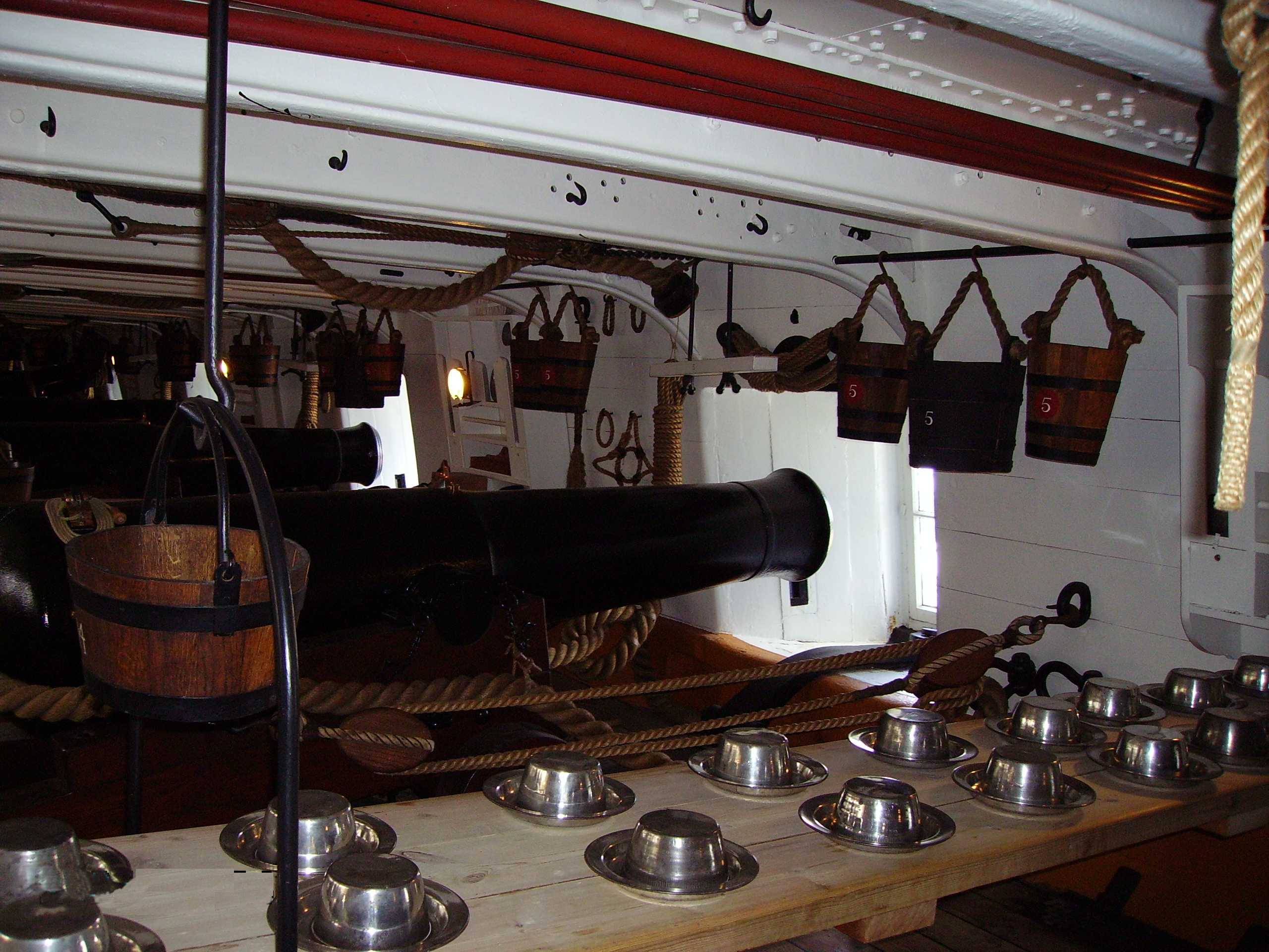 HMS Warrior between decks